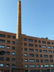 Xemeneia del Vapor de Ca l'Estruch, situada a la Plaça Enric Casassas (Sabadell, Vallès Occidental).